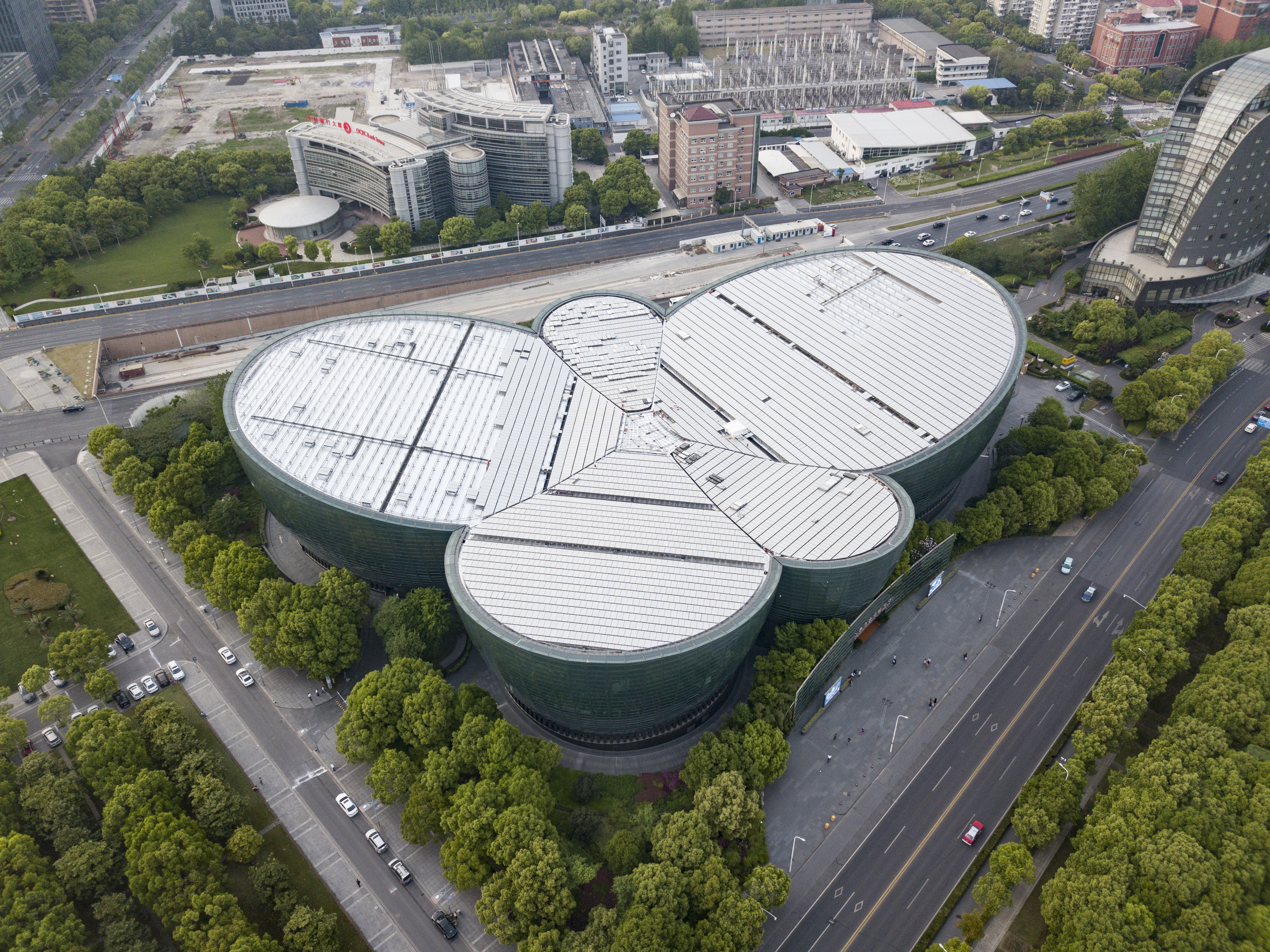 中文（中国大陆）: 东方艺术中心·上海浦东·俯视